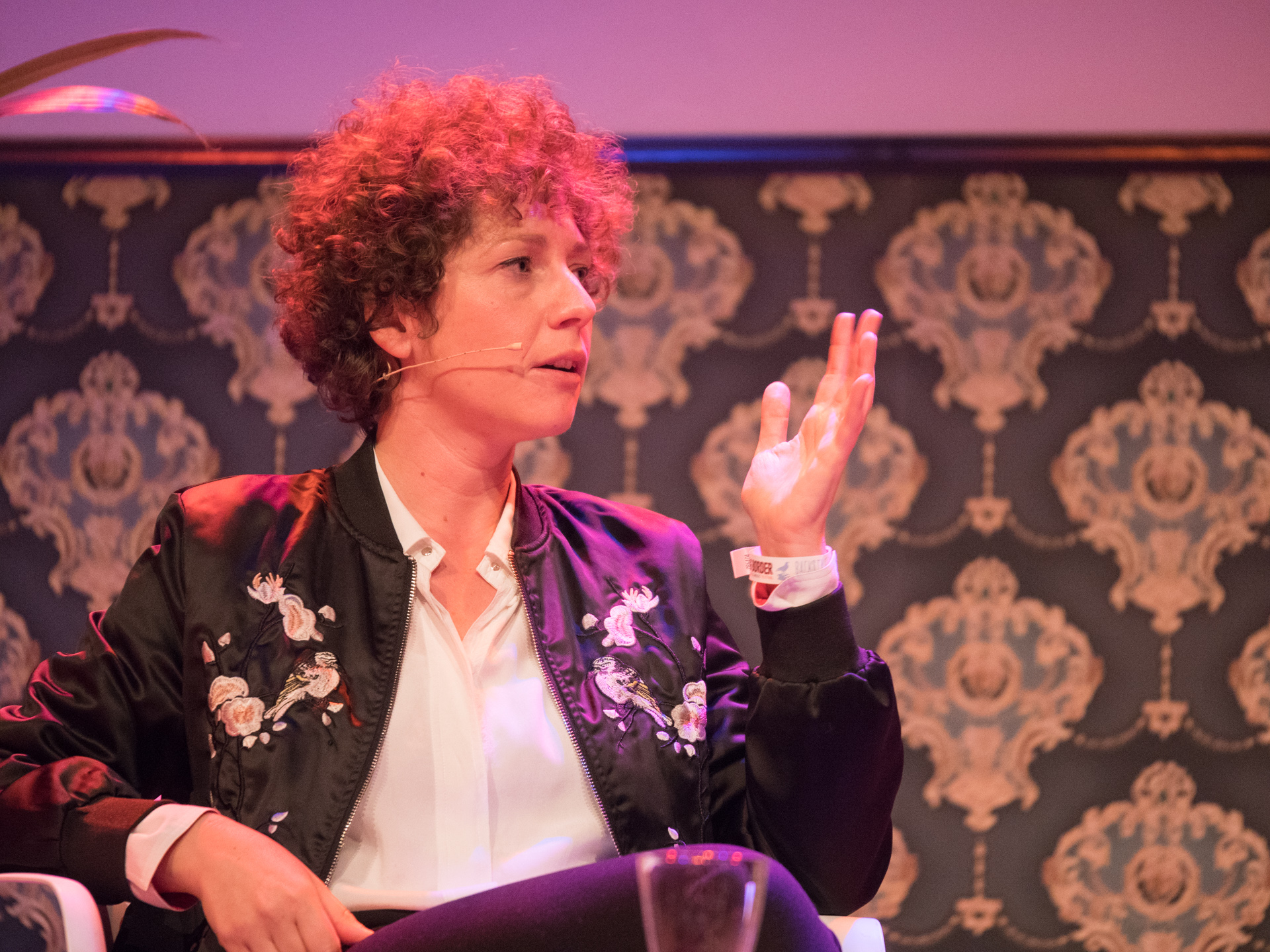 Sasha Marianna Salzmann op het Crossing Border Festival in Den Haag op 3 november 2018